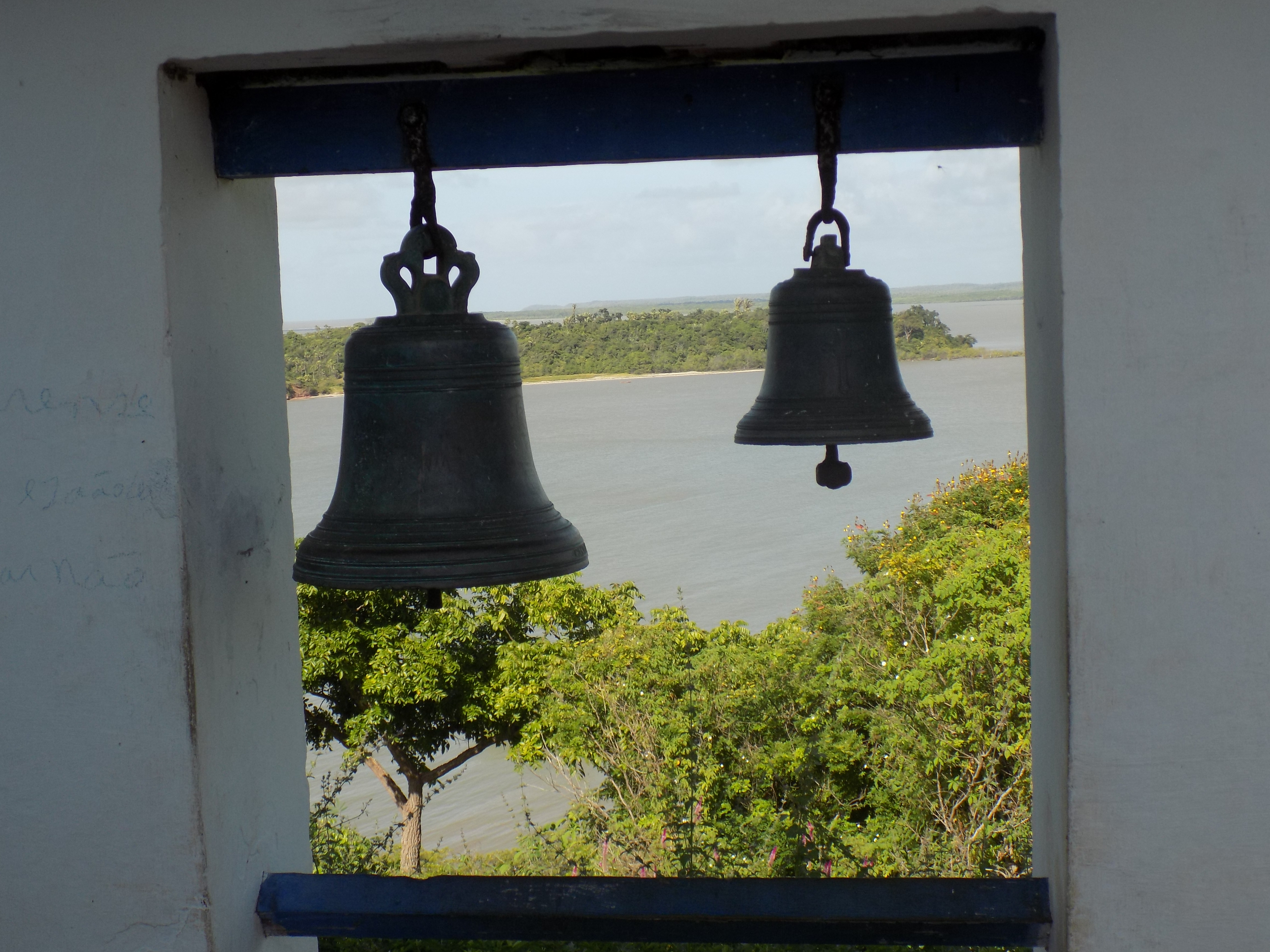 Alcântara, MA: conjunto arquitetônico e urbanístico